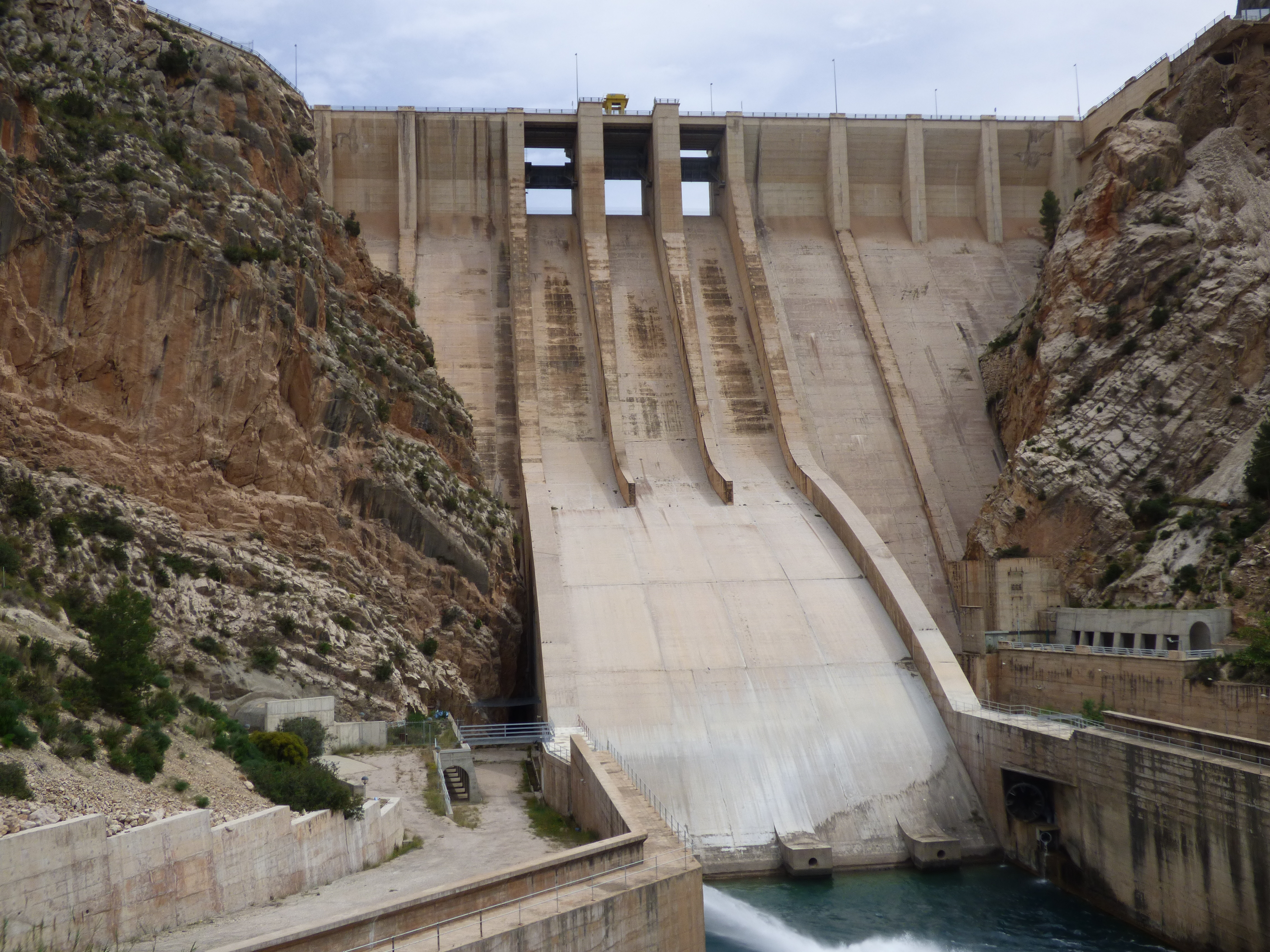 Presa de Contreras